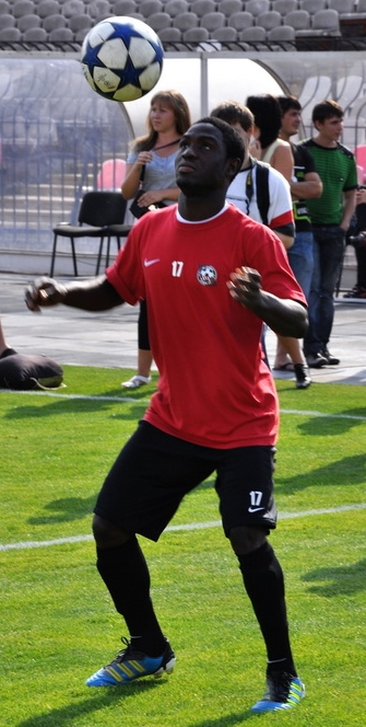 Мишель Бабатунде — нигерийский футболист